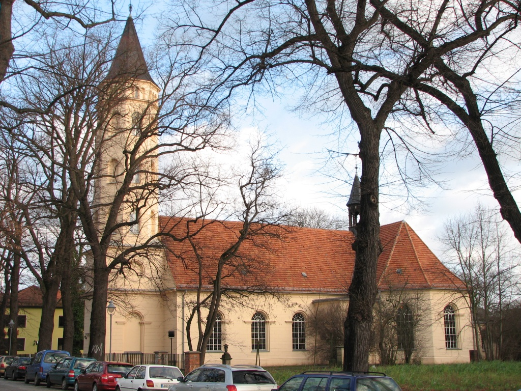 Kreuzkirche, evangelische Kirche in Königs Wusterhausen, Deutschland.